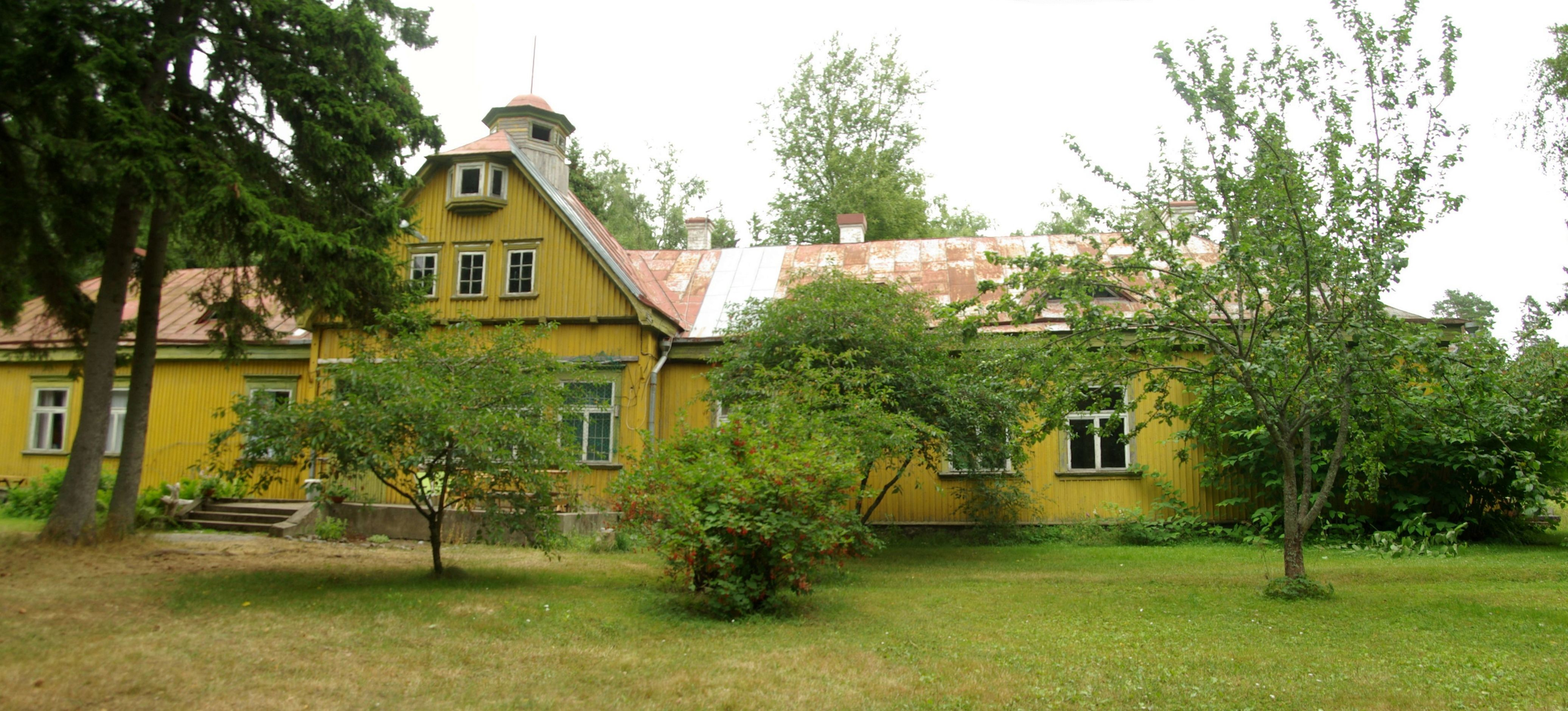 Harju maakond, Tallinna linn, Kesklinna linnaosa Aegna saar